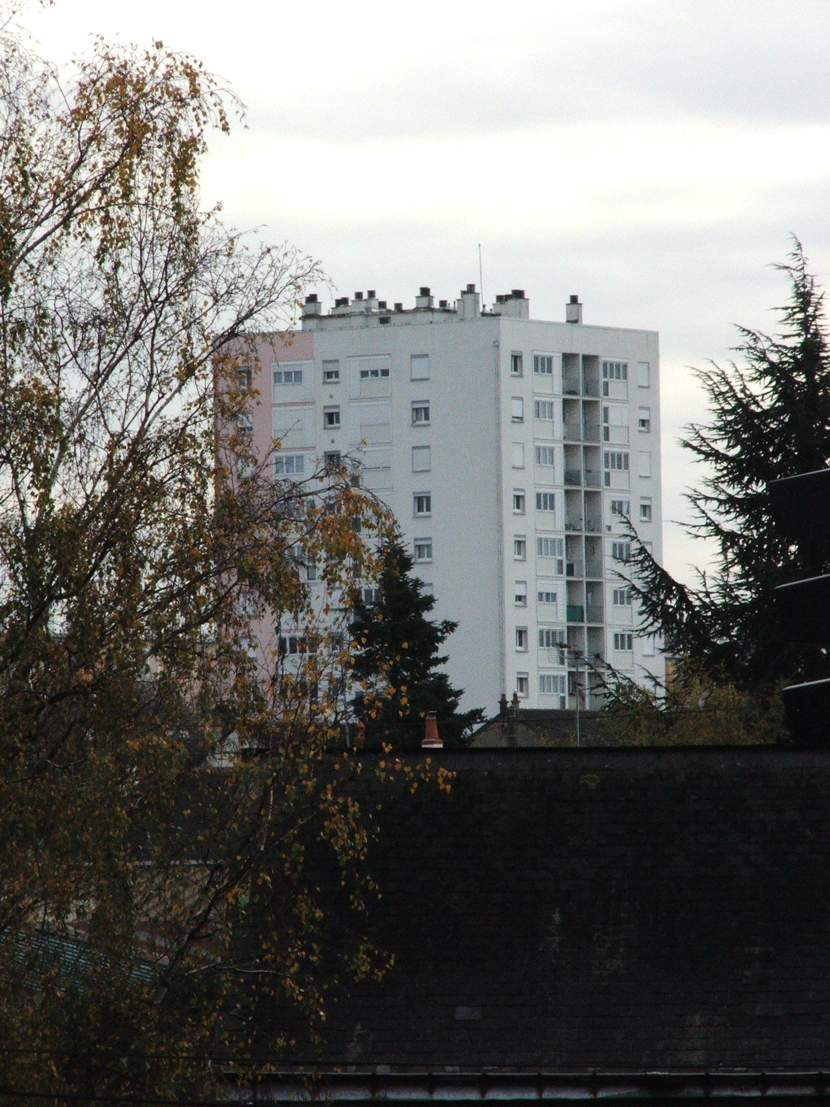 Une tour des Glonniere au sud du Mans.